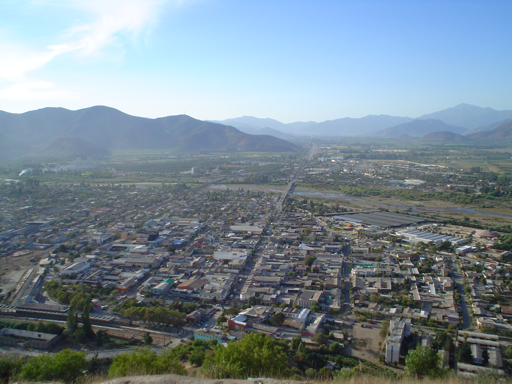 Vista desde cerro Puntilla de Lopez